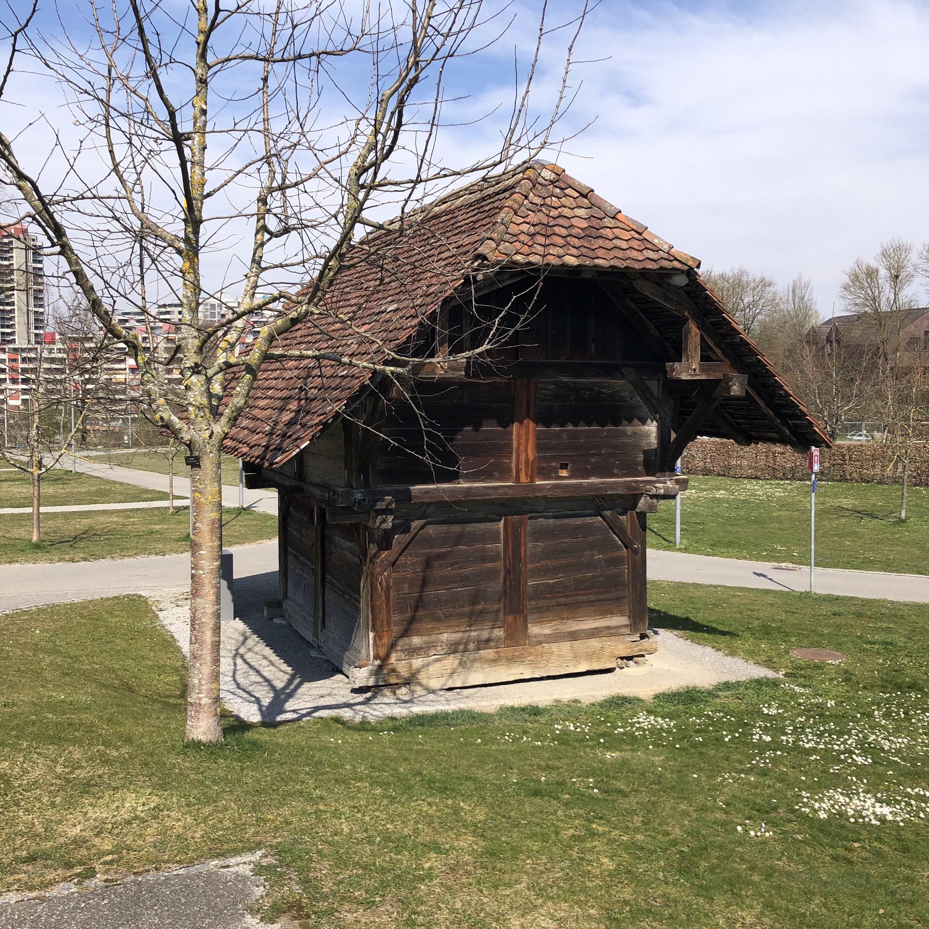 Parkanlage Brünnengut